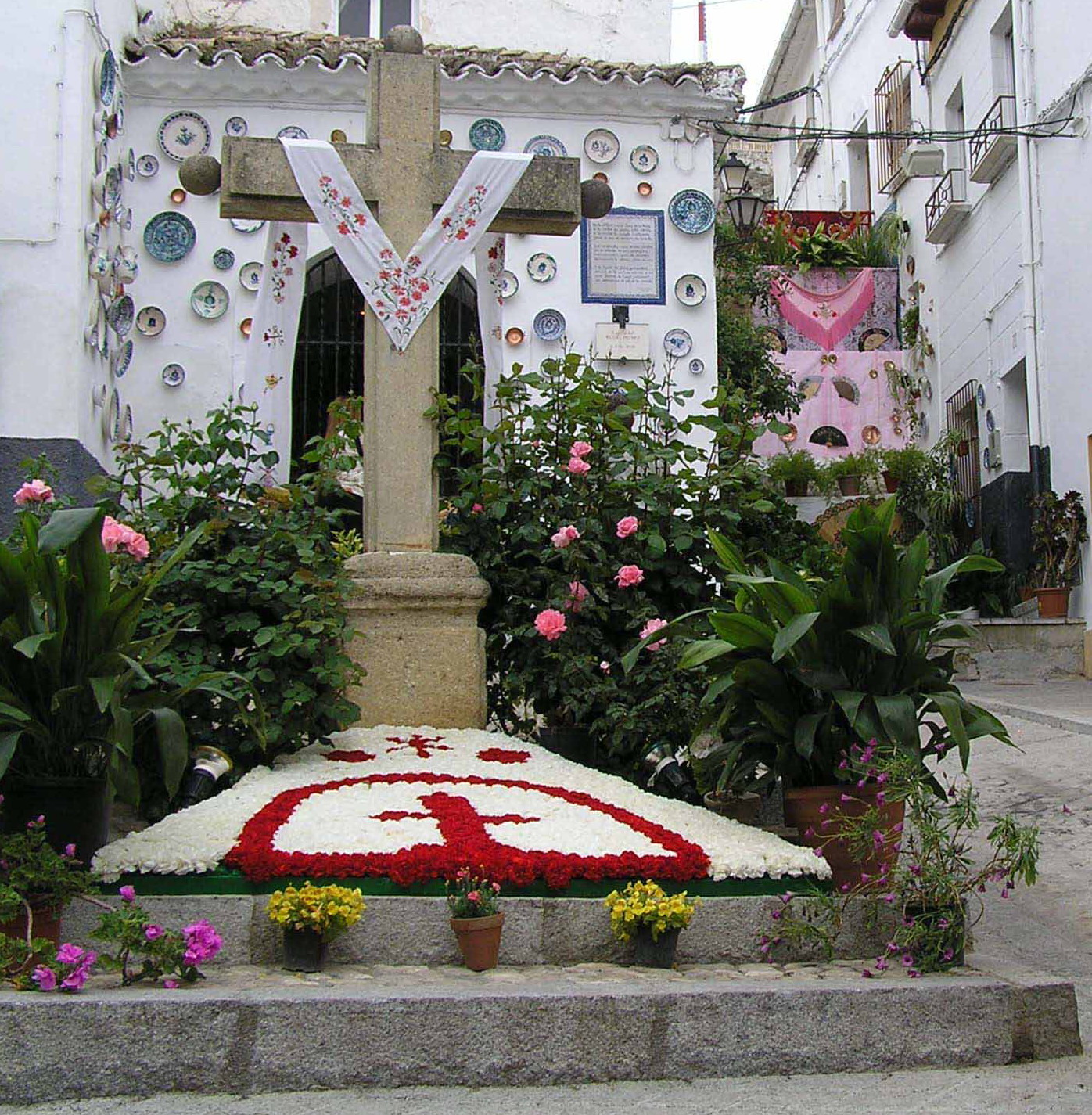 Cruz decorada para la fiesta de las cruces, en Alcalá la Real, Jaén, España.